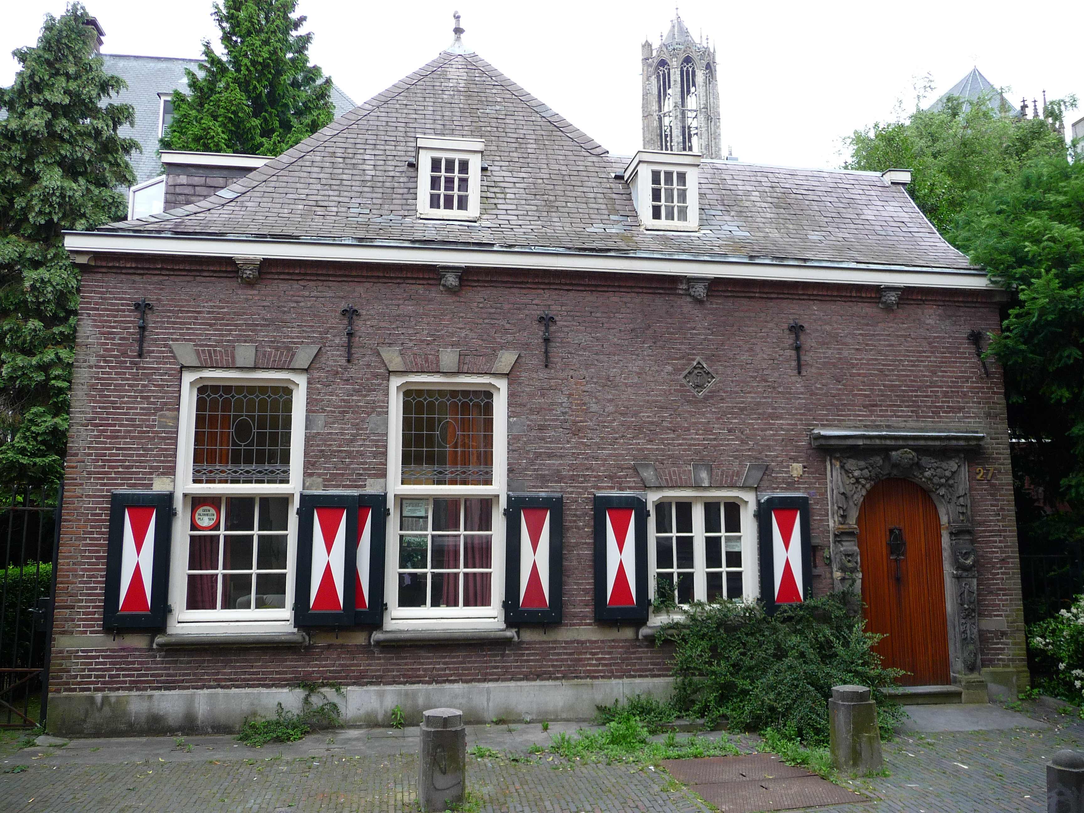 Rijksmonument aan Achter Sint Pieter 27 in Utrecht